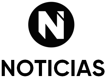 Logo utilizado a partir del 21/11/2018